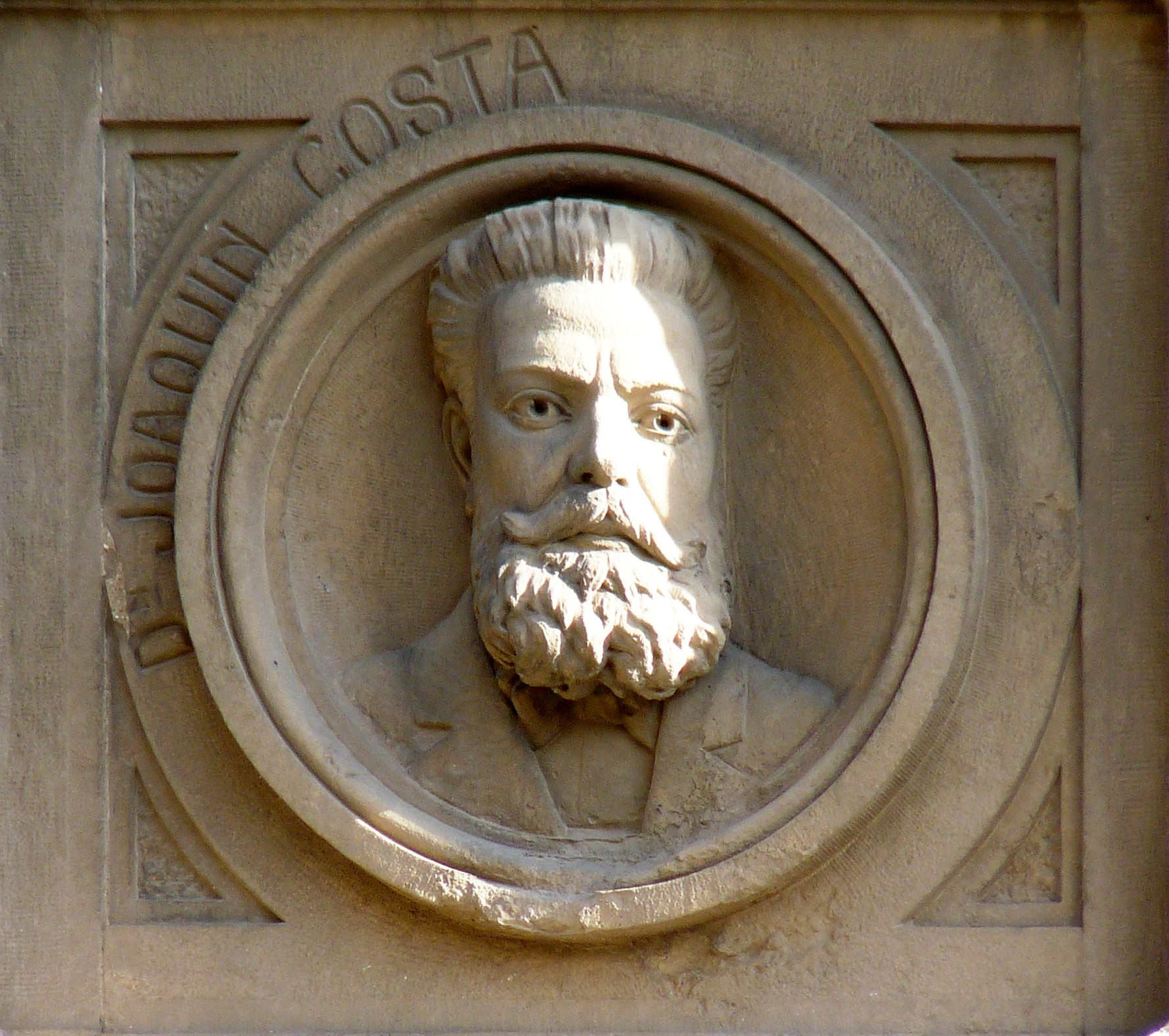 Zaragoza - Grupo escolar Gascón y Marín - Detalle de fachada: Joaquín Costa